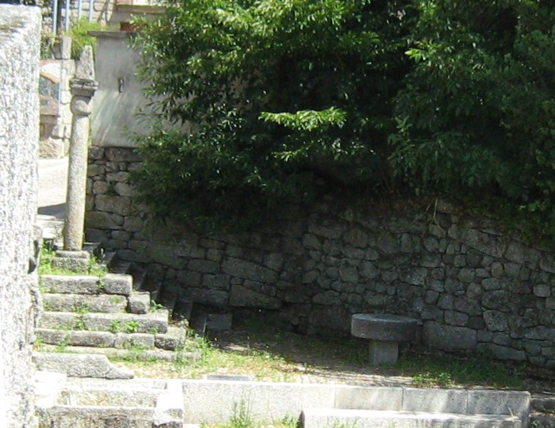 Pelourinho de aboadela, Pelourinho de Ovelha ou Pelourinho de Ovelha do Marão